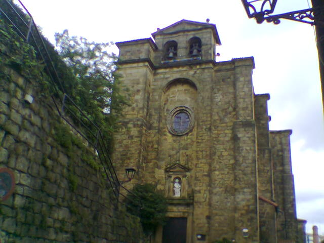 Pasajes de San Juan (Guipúzcoa)-Iglesia de San Juan